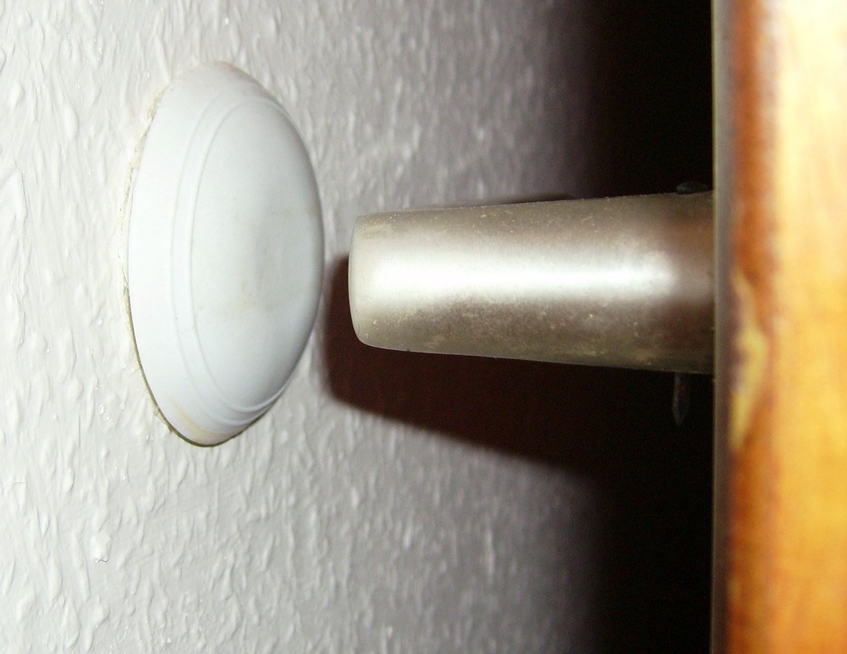 Türstopper